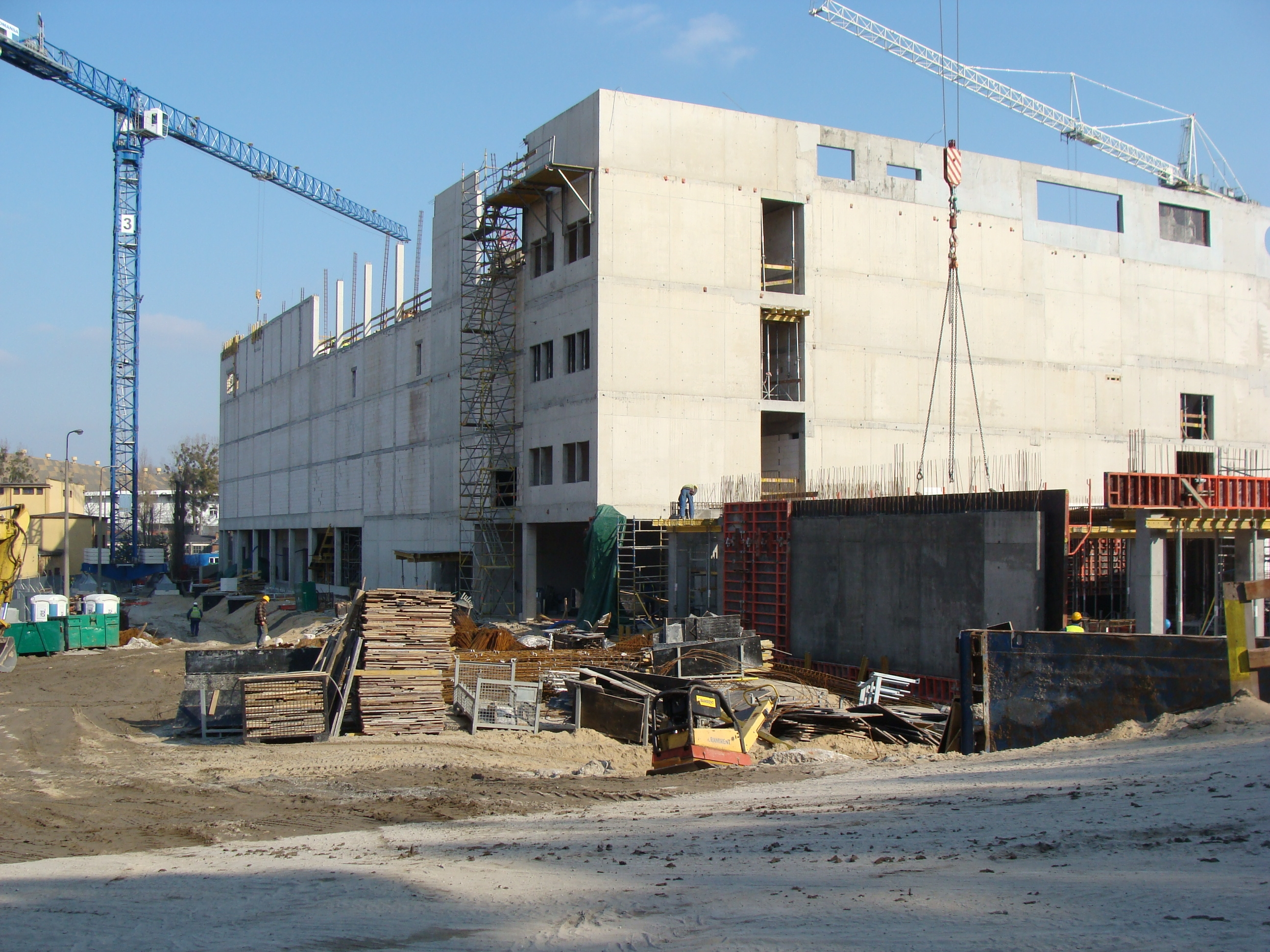 Budowa hali widowiskowo-sportowej w Toruniu